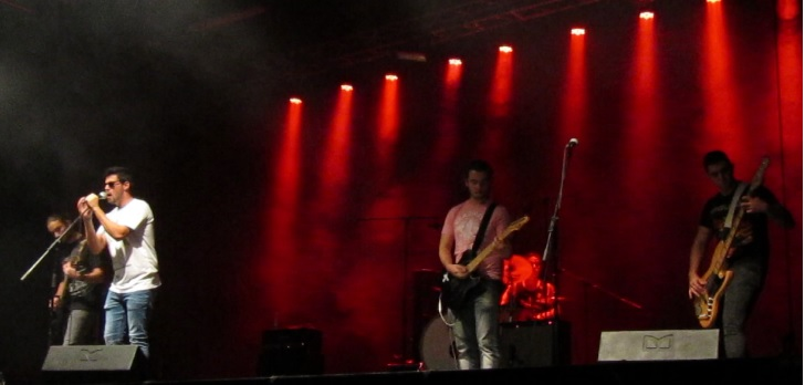 De esquerda a dereita: Adrian Rivas, Pablo Potel, Andrés Constantino, Cobi, David Domínguez no Festivalo'17 o 22 de setembro do 2017